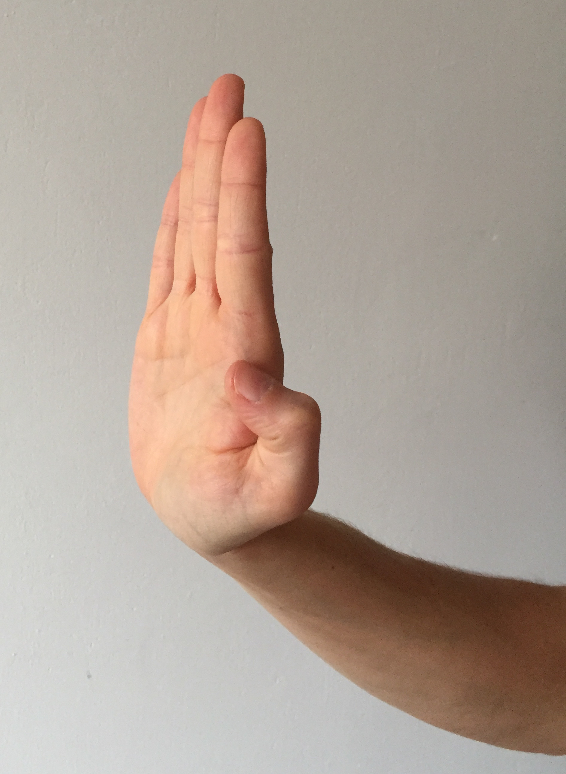 Style du Bouddha en Kung Fu